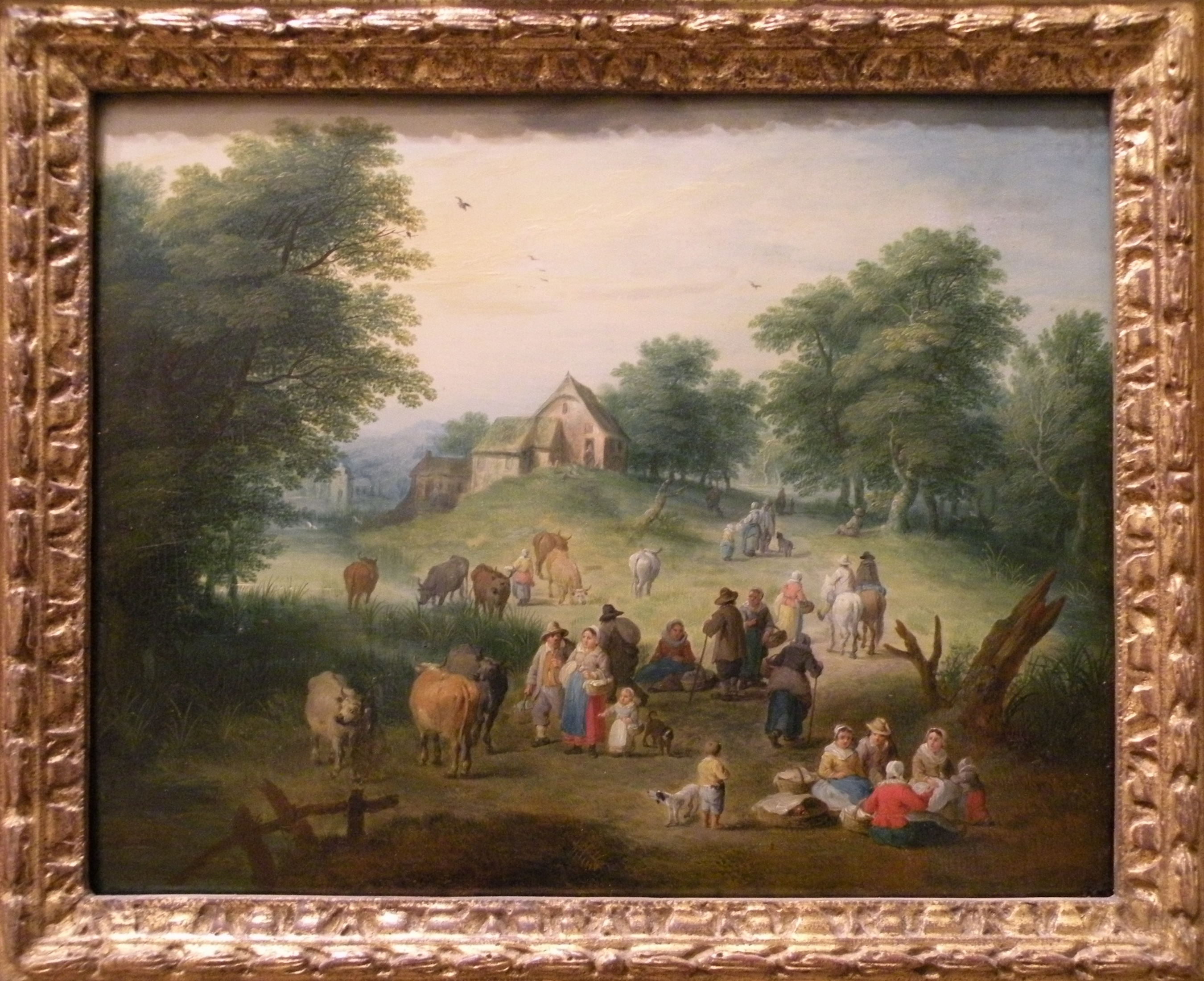 Scène champêtre, par Theobald Michau. Musée des Beaux-Arts de Rennes.